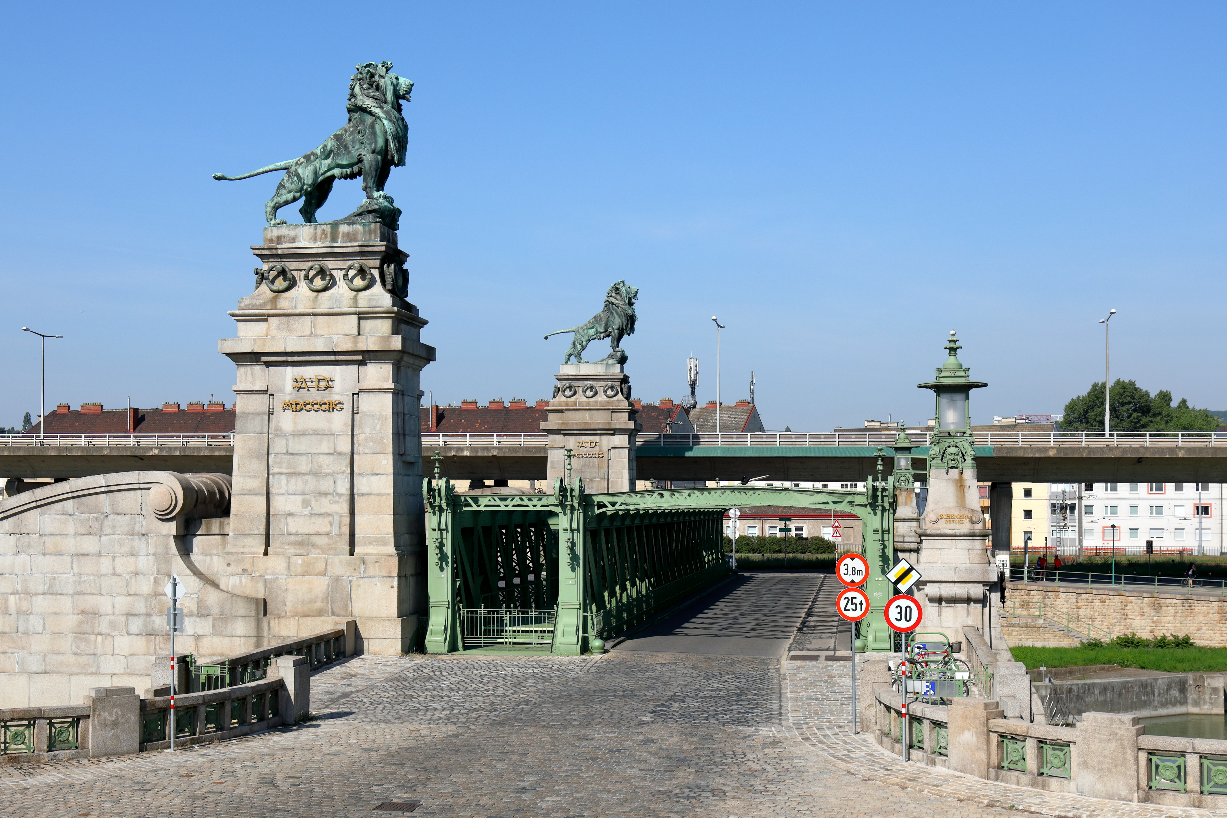 Ostansicht der Nussdorfer Wehranlage an der Grenze zwischen dem 20. Wiener Gemeindebezirk Brigittenau und dem 19. Gemeindebezirk Döbling und dahinter die Hochtrasse der Klosterneuburger Straße (B14), die von 1981 bis 1983 von der Baufirma H. Rella & Co. errichtet wurde.Der Bau der Wehranlage mit der Schemerlbrücke, eine doppelte Fachwerkbrücke mit drei Hauptwänden als konstruktiver Teil der Wehr, erfolgte von 1894 bis 1898 nach Plänen von Otto Wagner. Die beiden stromaufwärts blickenden Löwen, die auf den Mauerpfeilern der Sperrbrücke stehen, stammen von dem Bildhauer Rudolf Weyr. Zur Wehranlage gehört auch noch das ehemalige Verwaltungsgebäude für die „Donau-Regulierungs-Commission“, ein sogenanntes „Kettenmagazin-Gebäude“, ein 2004/2005 errichtetes Kleinkraftwerk mit 12 Matrix-Turbinen und eine 2017 in Betrieb genommene Fischtreppe.